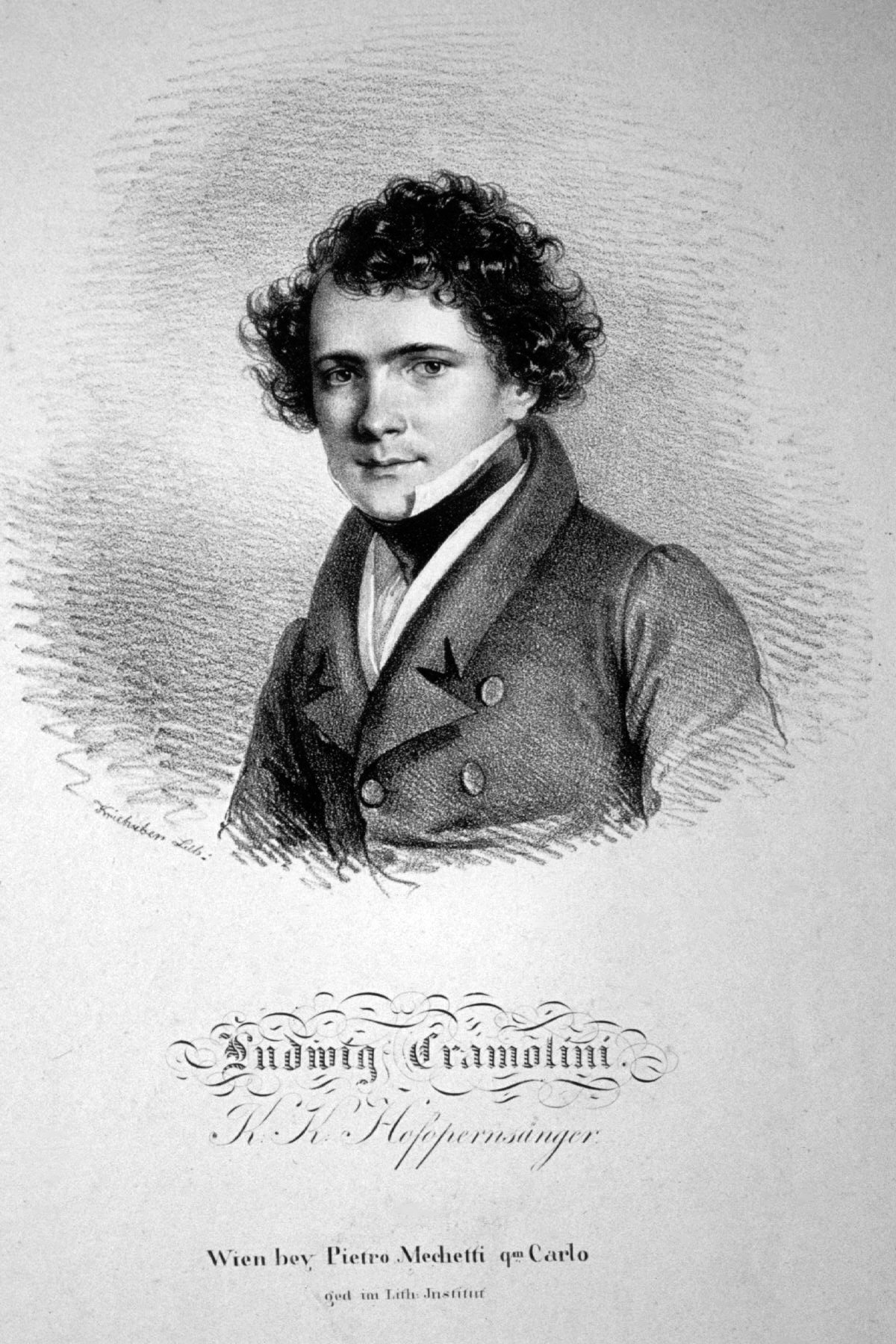 Ludwig Cramolini (1805-1894) Opernsänger (Tenor), Regisseur. Lithographie von Josef Kriehuber, um1825